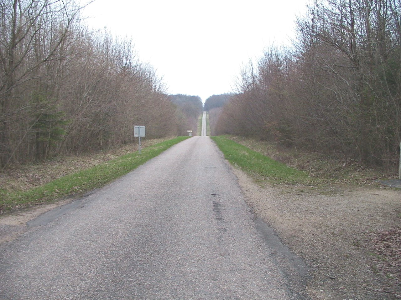 Tranchée de Calonne, chemin forestier entre Hattonchâtel et Verdun. Photo prise le 17 avril 2006 par F5ZV au niveau de la fosse d'Alain Fournier et de ses compagnons.